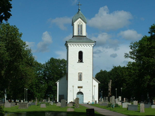 Grinstad kyrka.